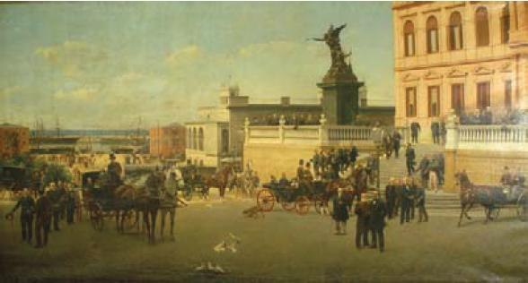 Óleo de Cortazzo sobre la inauguración de la primera etapa del Puerto Madero en Buenos Aires, con presencia del Presidente Miguel Juárez Celman partiendo desde las escalinatas de la Casa Rosada en carruaje.